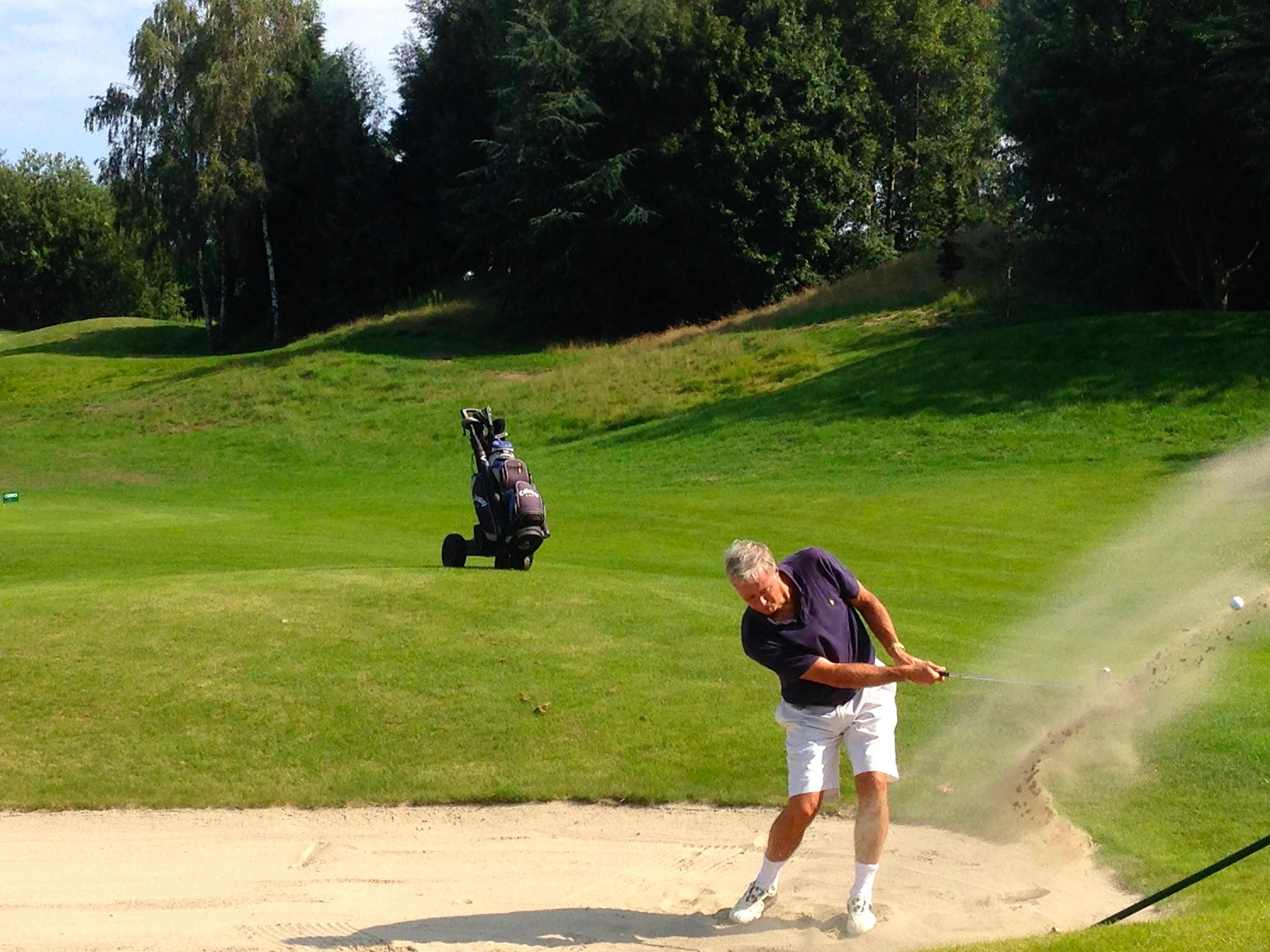 Green Side Bunker Shot (58° sand wedge) @ Golf club de Sept Fontaines (Belgium)